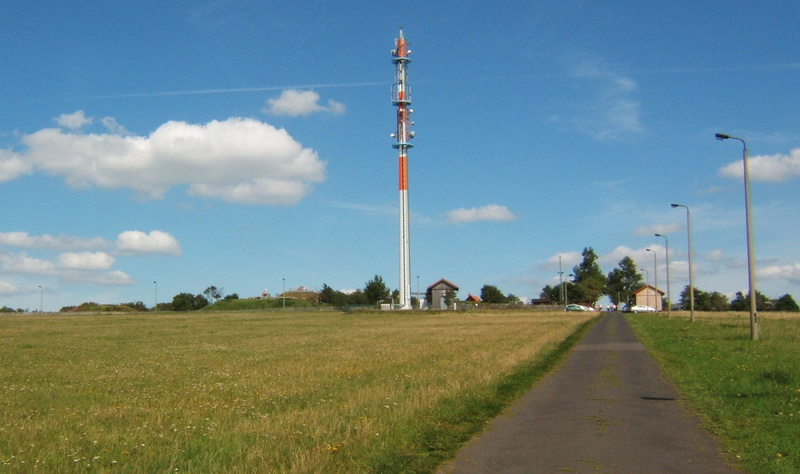 Der Gebaberg, Rhön, Deutschland